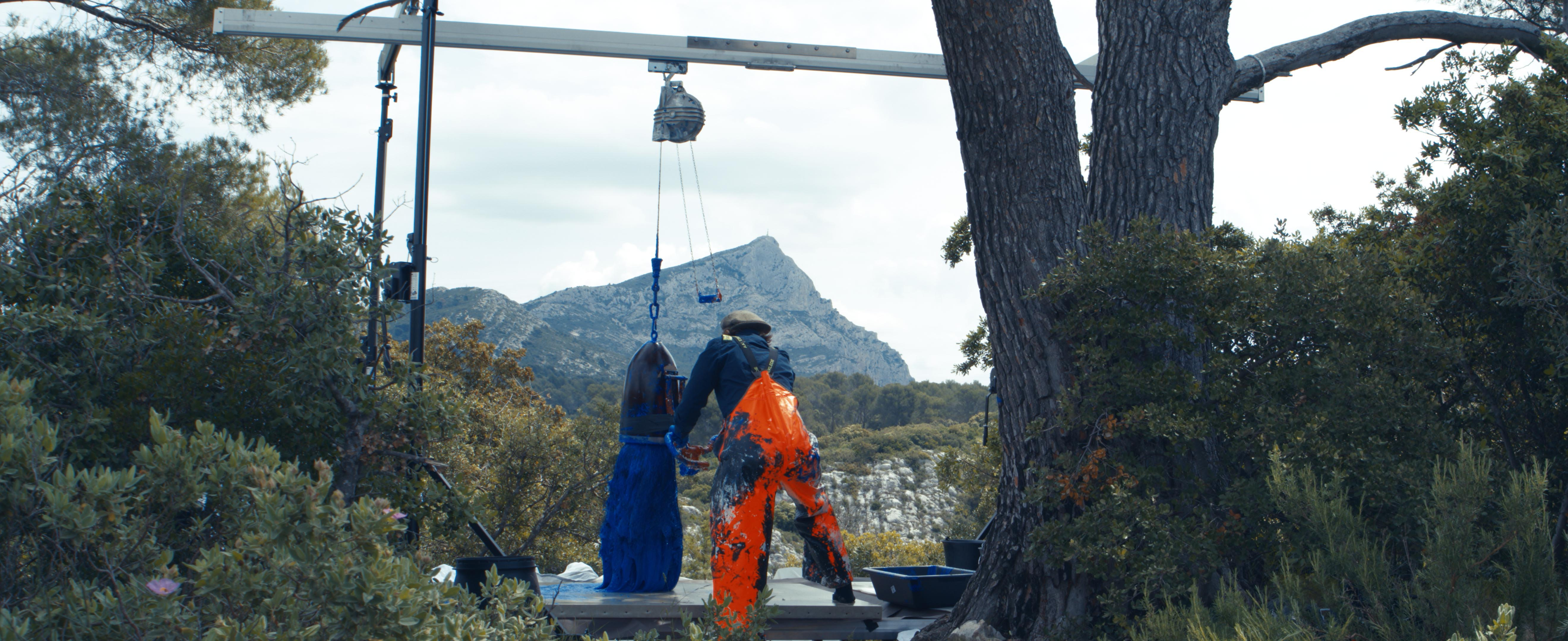 Extrait du film de Martin Baizeau, Atelier nomade, 2019, prod. Energy fields, montrant Fabienne Verdier.